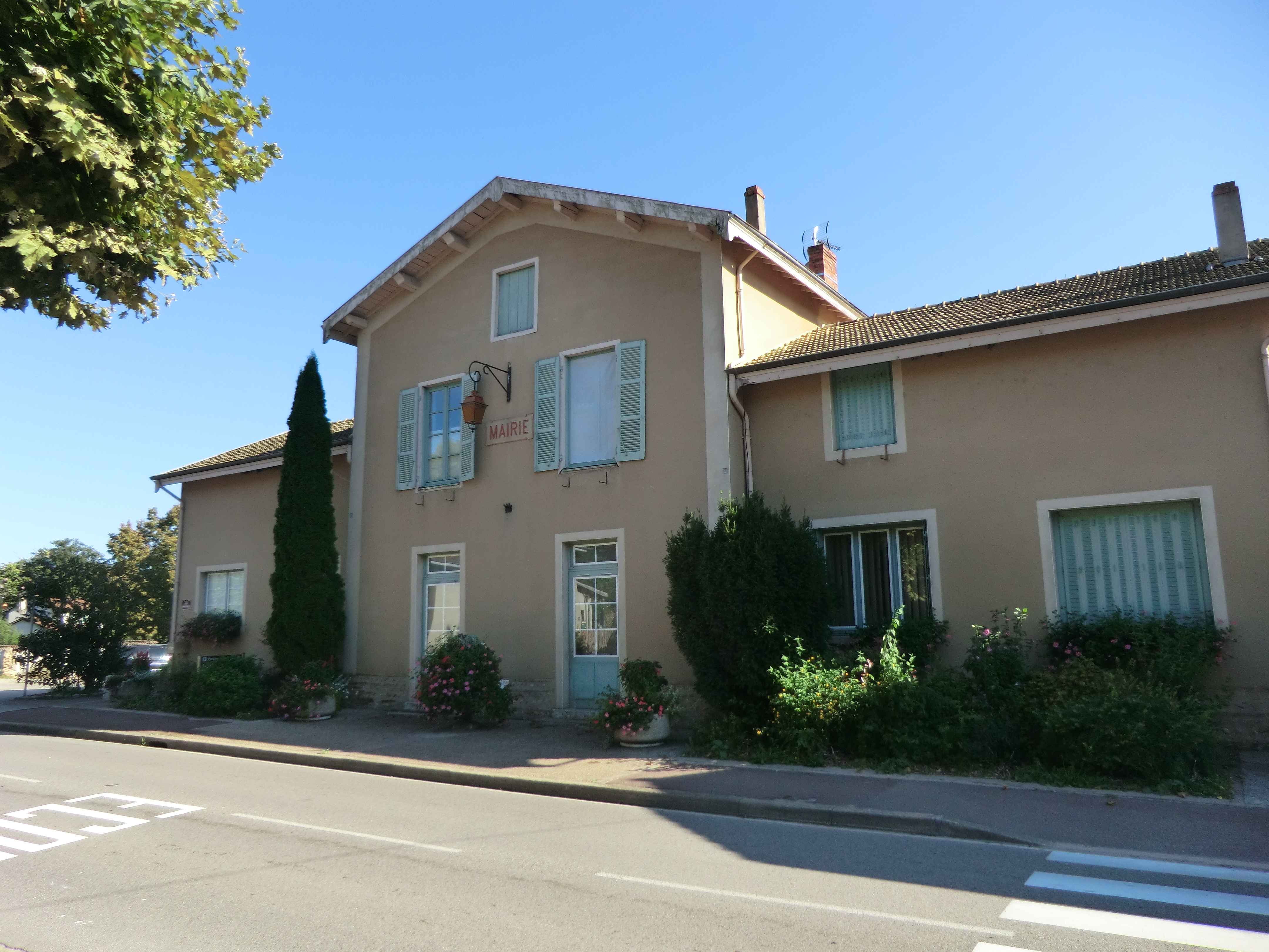 Mairie de Versailleux.